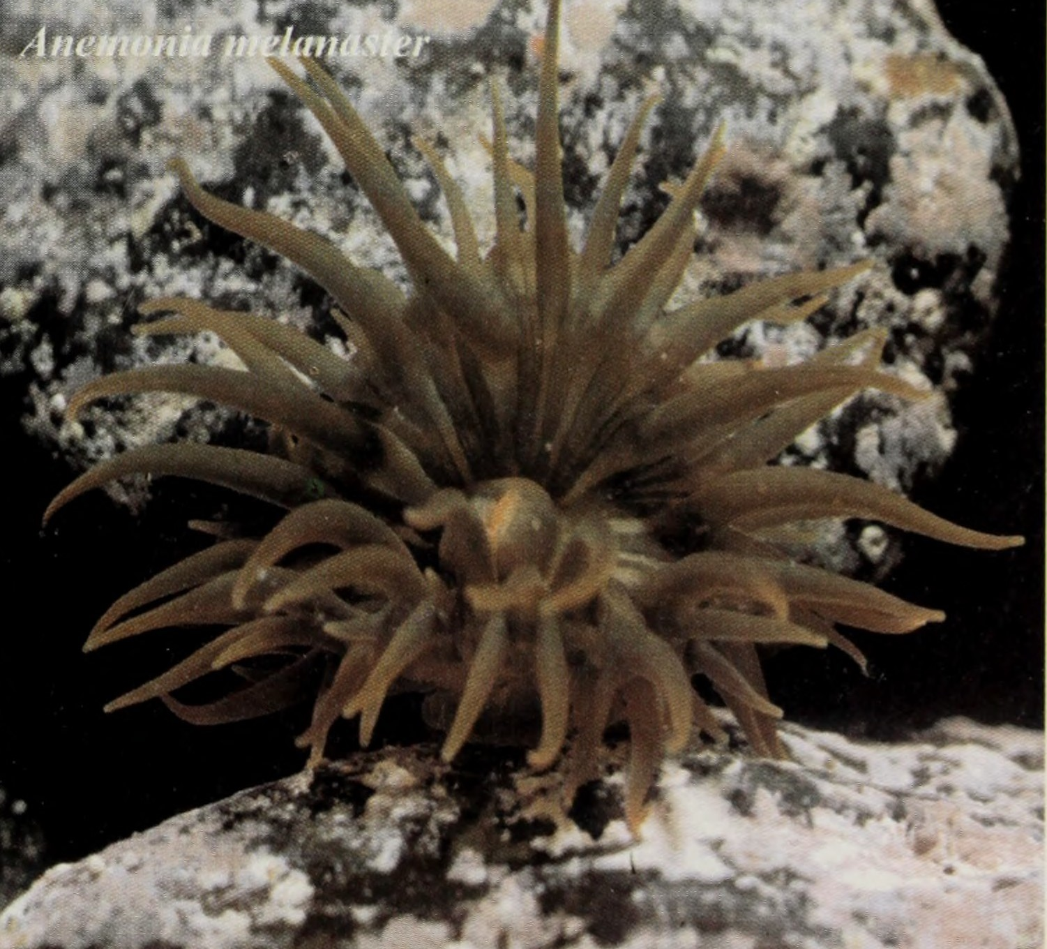 Anemonia melanaster en Guanahacabibes, Cuba.